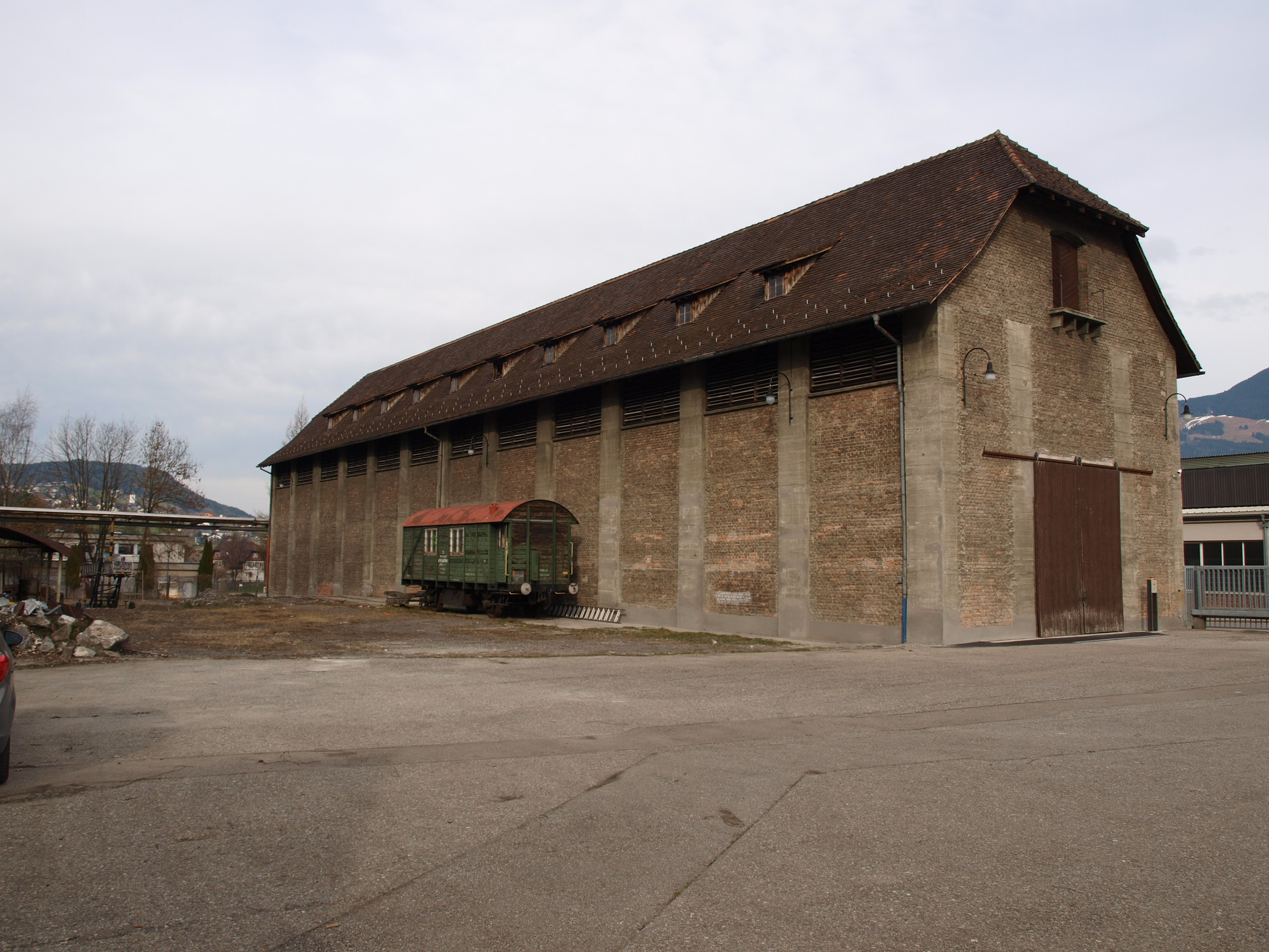 Suedseite des Feuerwehrmuseums in Frastanz im Feuerwehrmuseum in Frastanz.